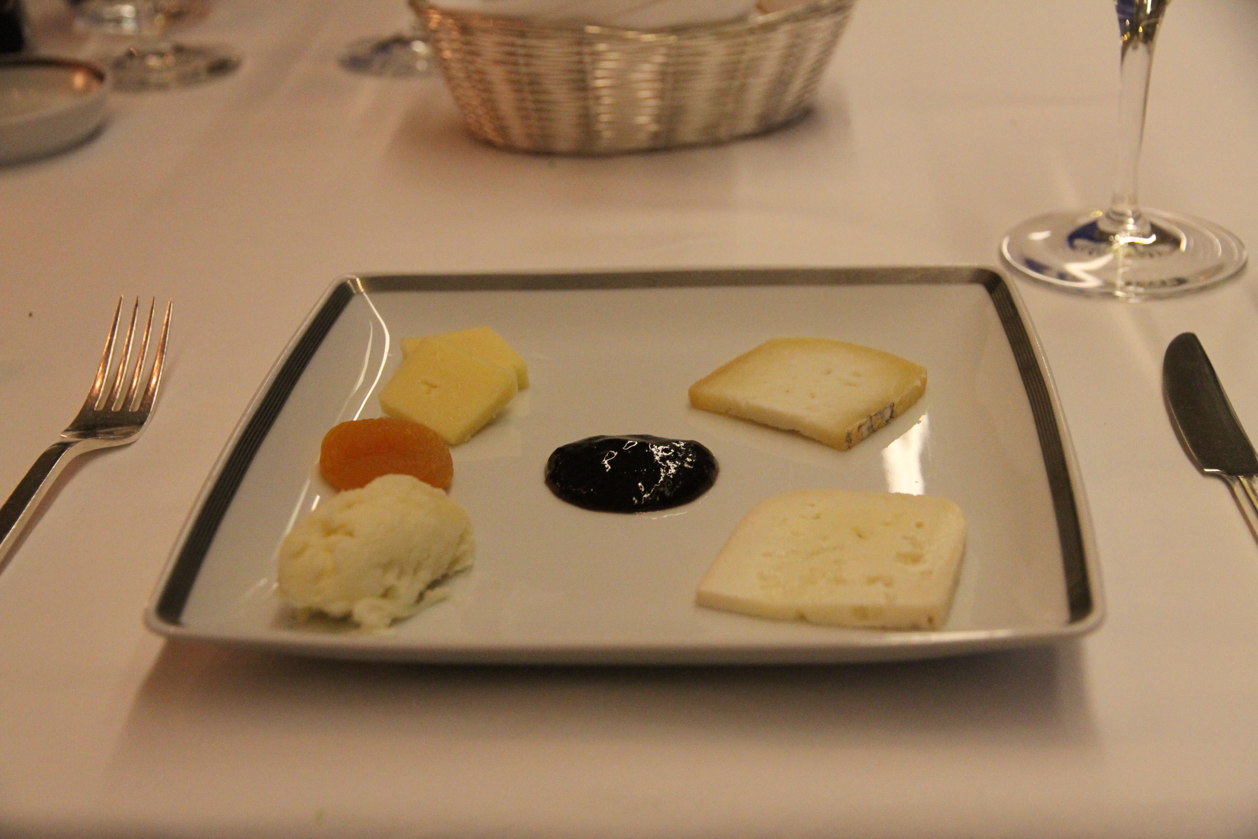 6.26.2011 - 7.3.2011 Lisbon travel